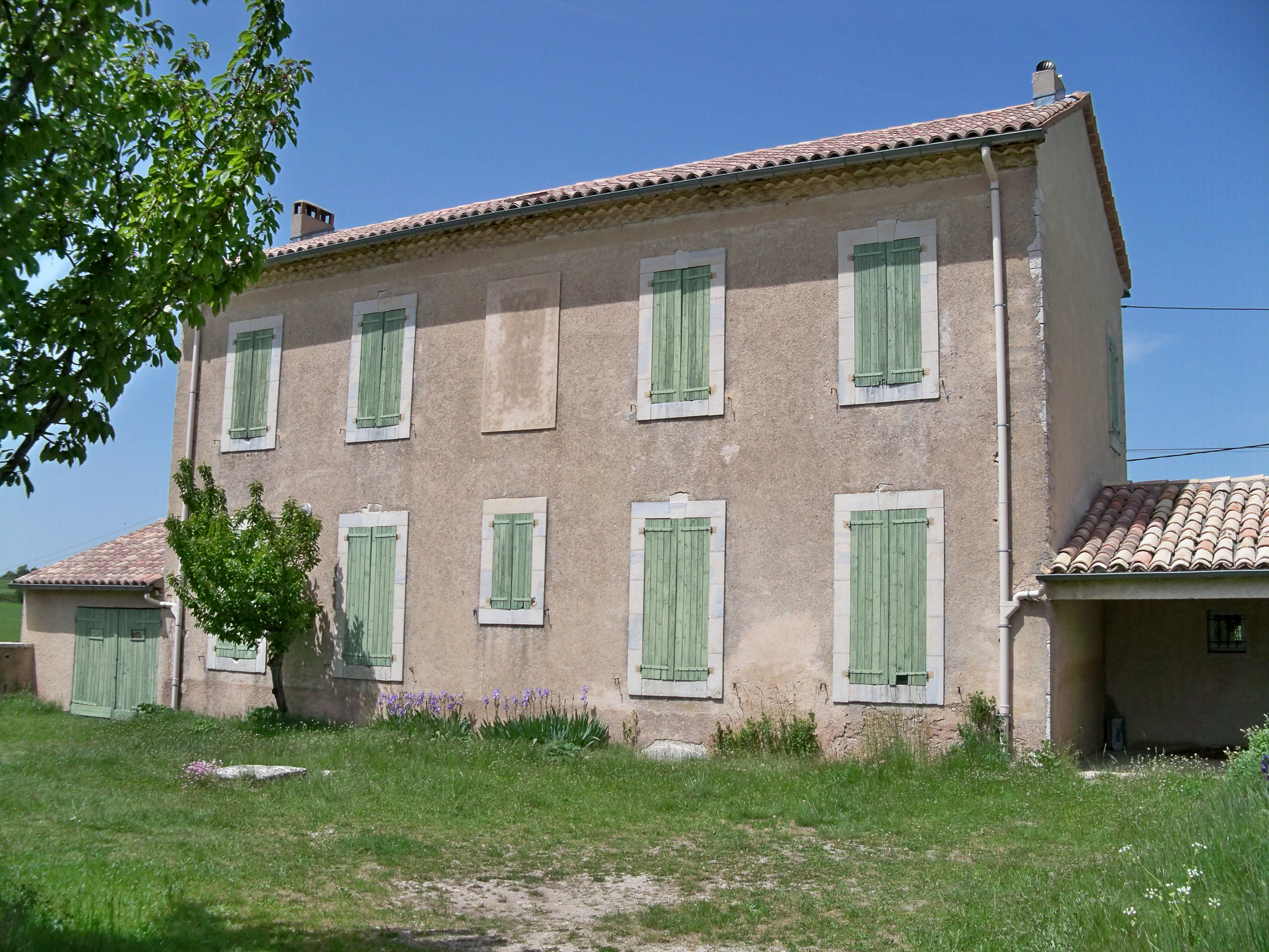 ancienne école du Redortiers (04)